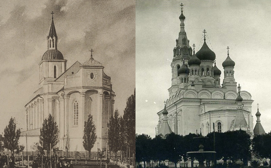 Беларуская (тарашкевіца): Маскалізацыя (русіфікацыя) Вялікага Княства Літоўскага. Места Горадня. Фара Вітаўта, помнік архітэктуры готыкі і рэнэсансу: выгляд да (налева) і па маскоўскай перабудове (направа)